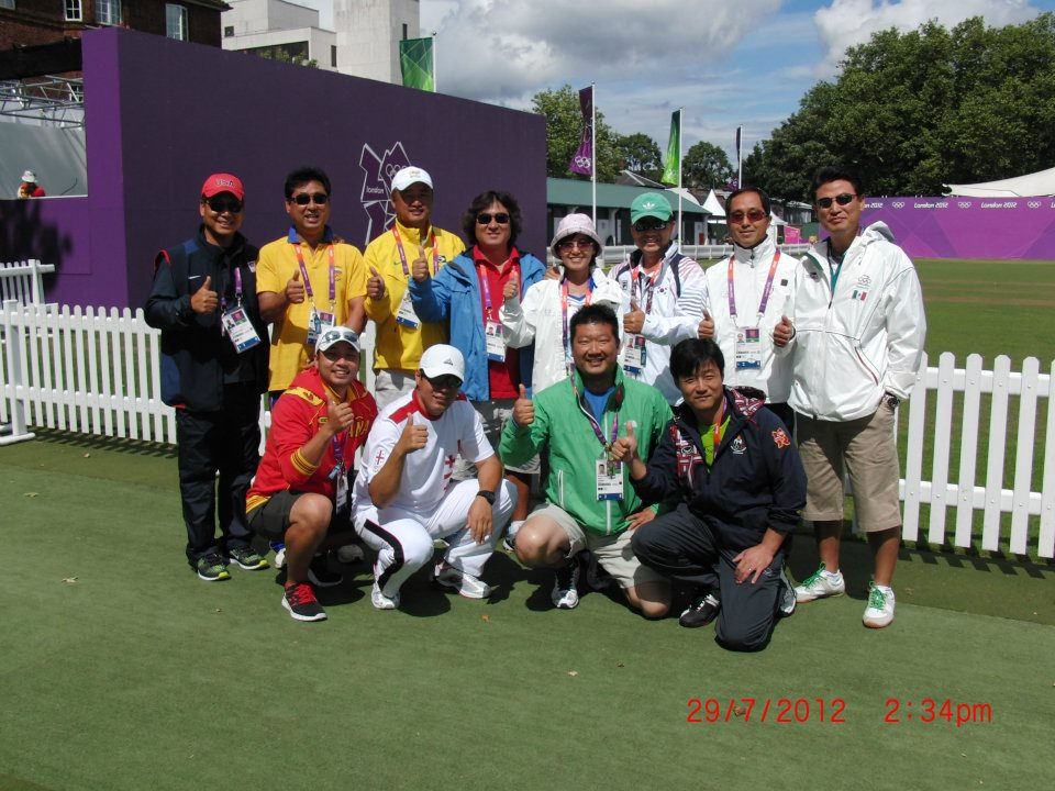 London Olympic Games 2012 Korean coaches.